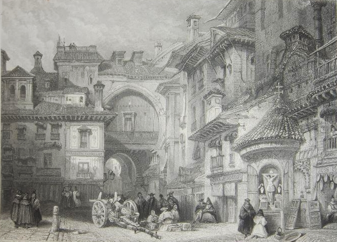 Plaza de Bib-Rambla en Granada. En The Tourist in Spain.